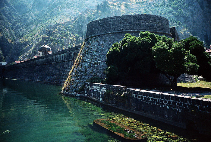 Kotor